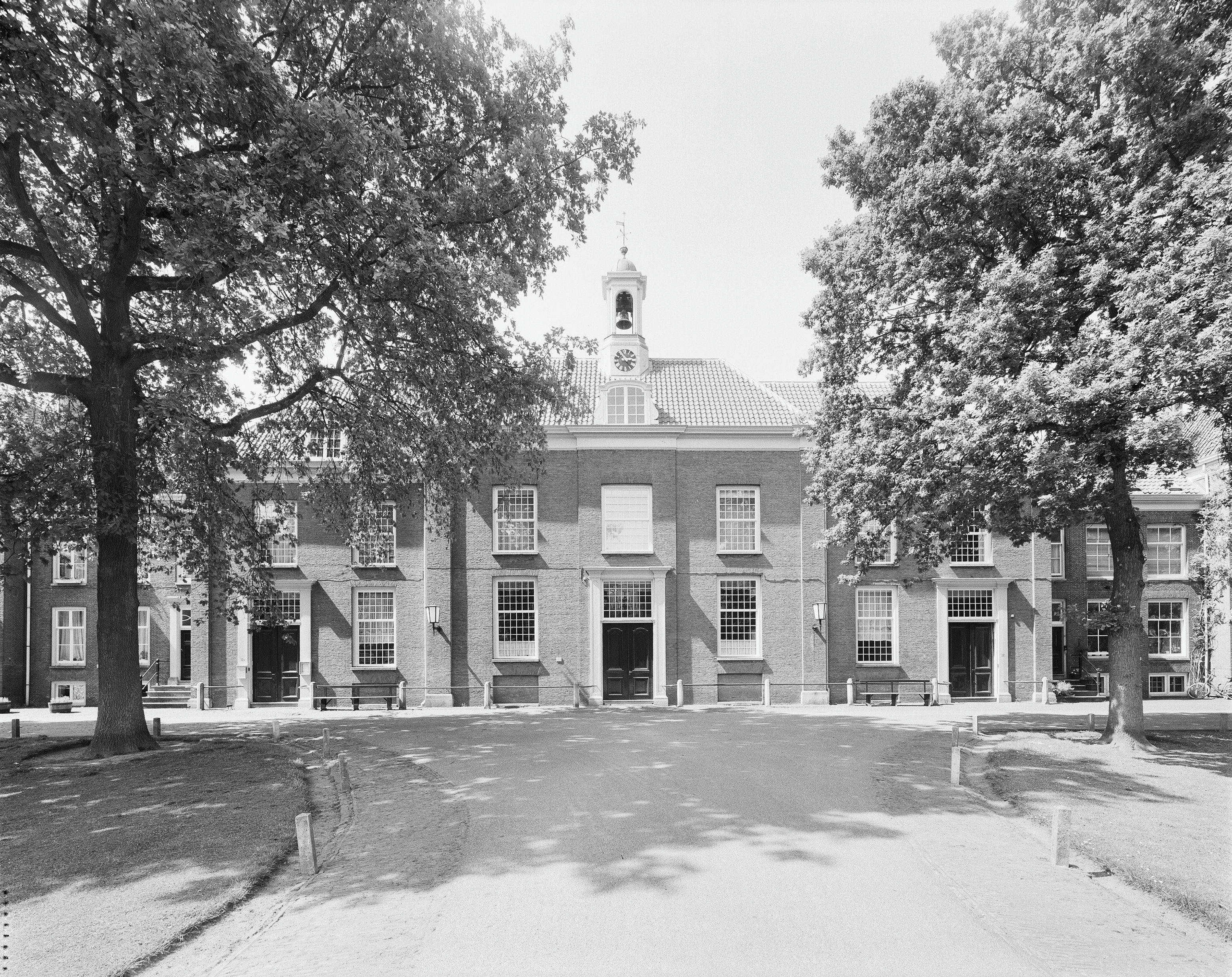 Evangelische Broedergemeente: Overzicht kapel (opmerking: gemaakt t.b.v. van boek 'Utrechtse Heuvelrug' (C.L. van Groningen))